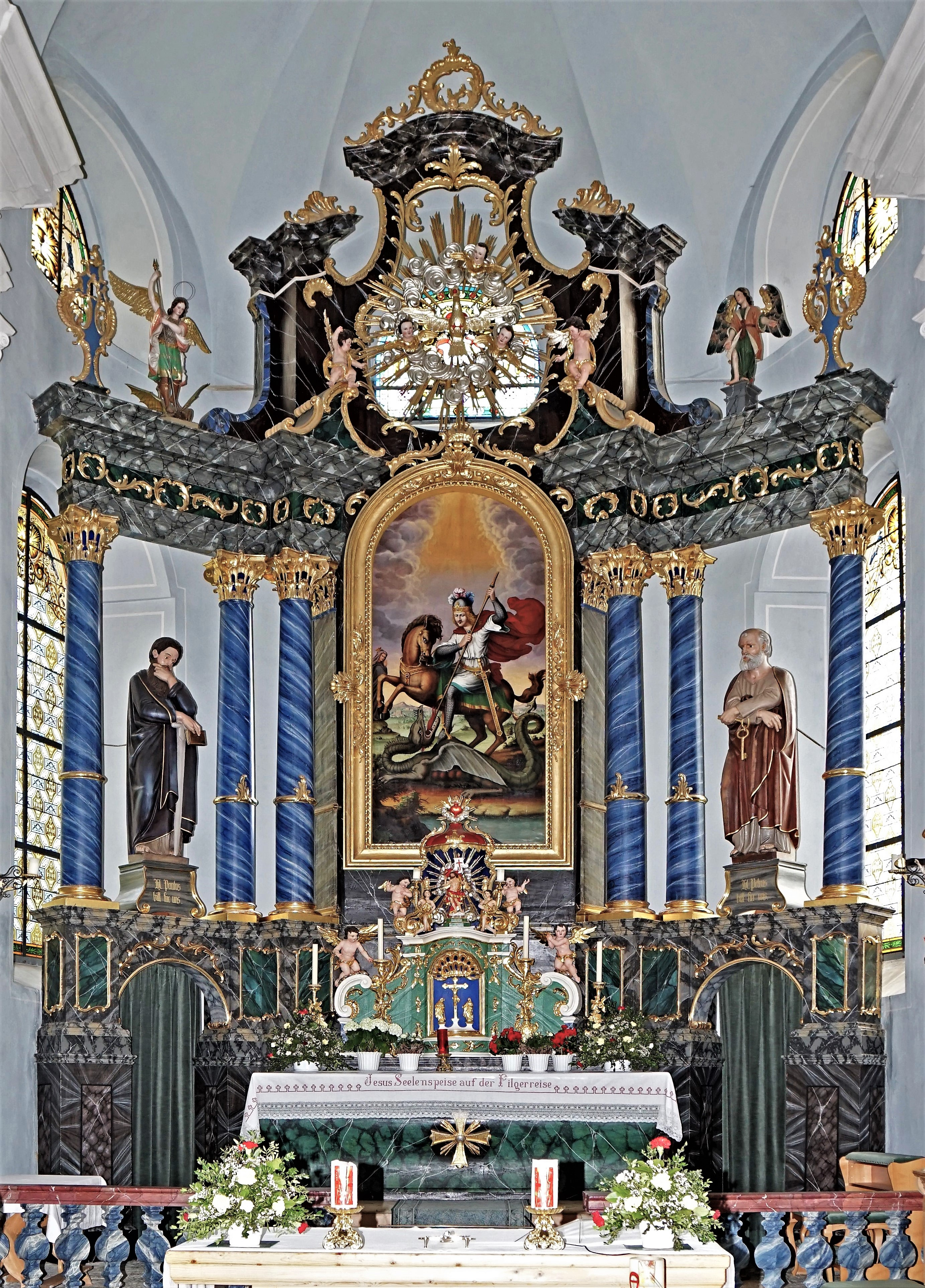 Filialkirche St. Georgen ( Rennweg am Katschberg), barocker Hochaltar